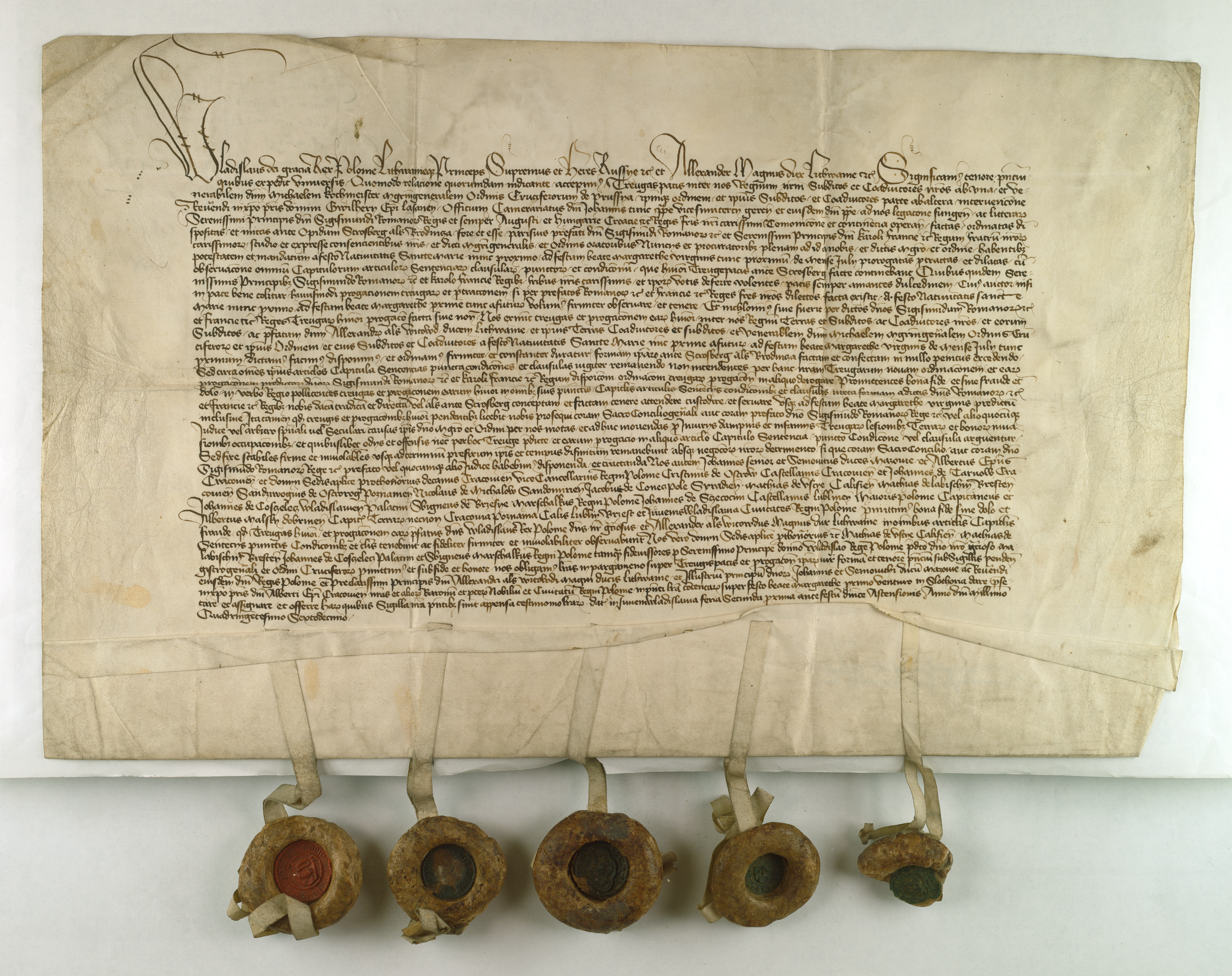 Władysław, król polski i Aleksander, wielki ks. litewski zobowiązują się zachować rozejm zawarty w Brodnicy (Strosberg) z Michałem Küchmeistrem wielkim mistrzem zakonu krzyżackiego, co potwierdzają polscy dostojnicy: Dunin ze Skrzyńska, podkanclerzy; Maciej z Wąsosza, wojewoda kaliski; Maciej z Łabiszyna, wojewoda brzeski; Jan z Kościelca, wojewoda inowrocławski; Zbigniew z Brzezia, marszałek koronny.